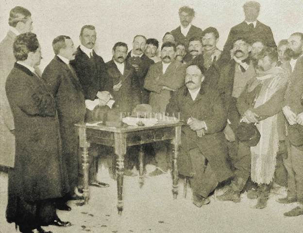 Grito de Alcorta (1912, prov. de Santa Fe, Argentina).